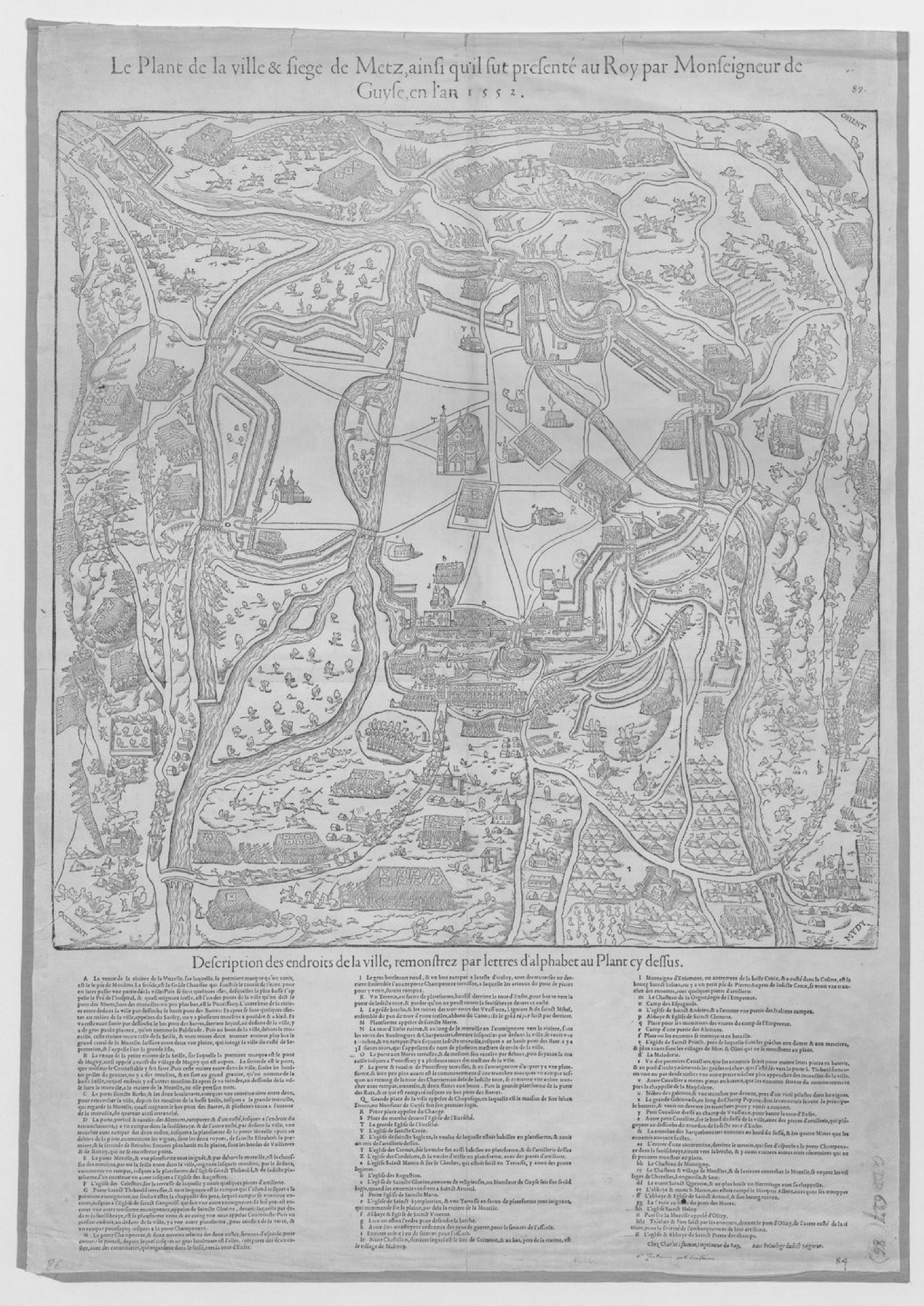 Le plan de la ville et le siege de Metz en 1552